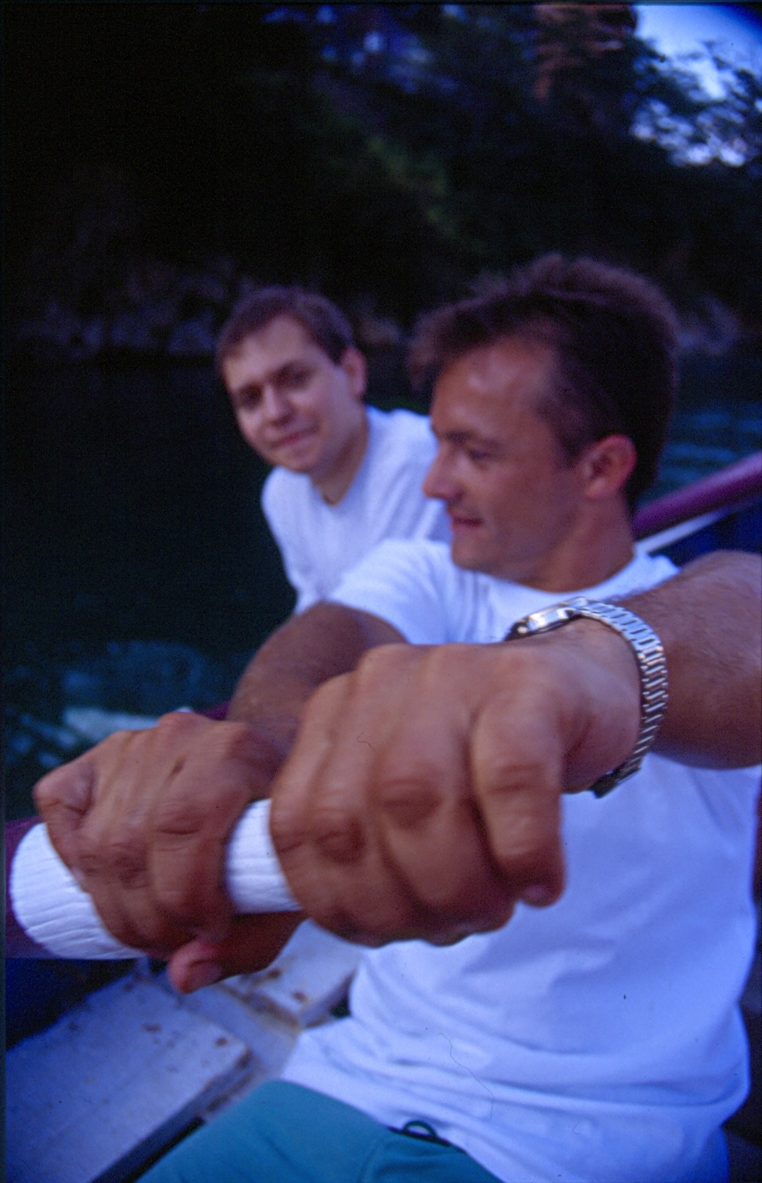 Lekeitioko arraunlaria potinean, boga eginez. Gidoia oratzen duten eskuen detailea.